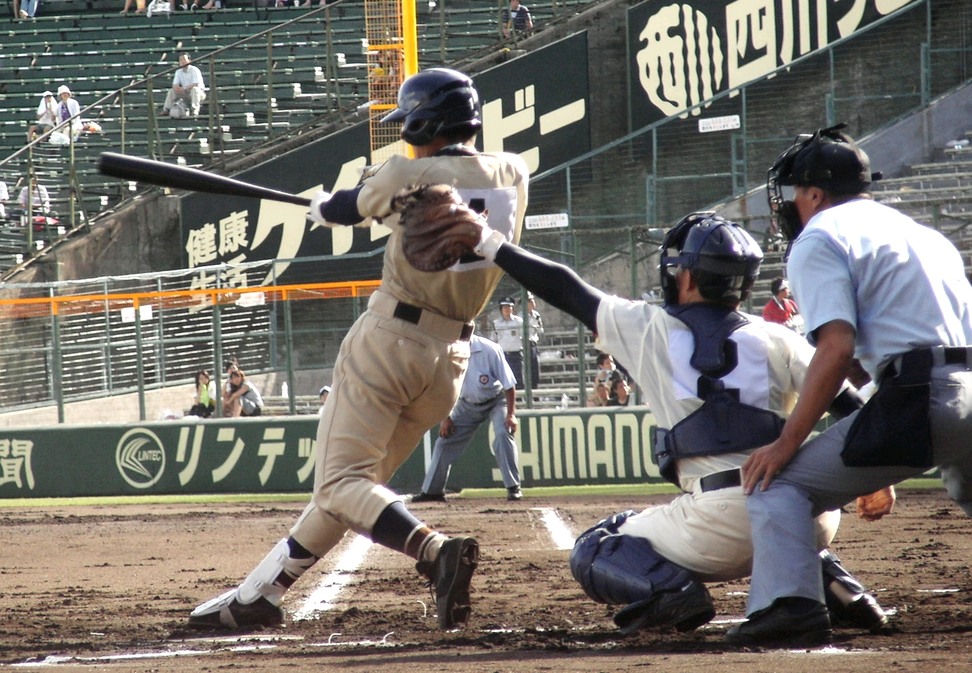 Hanshin Koshien Stadium